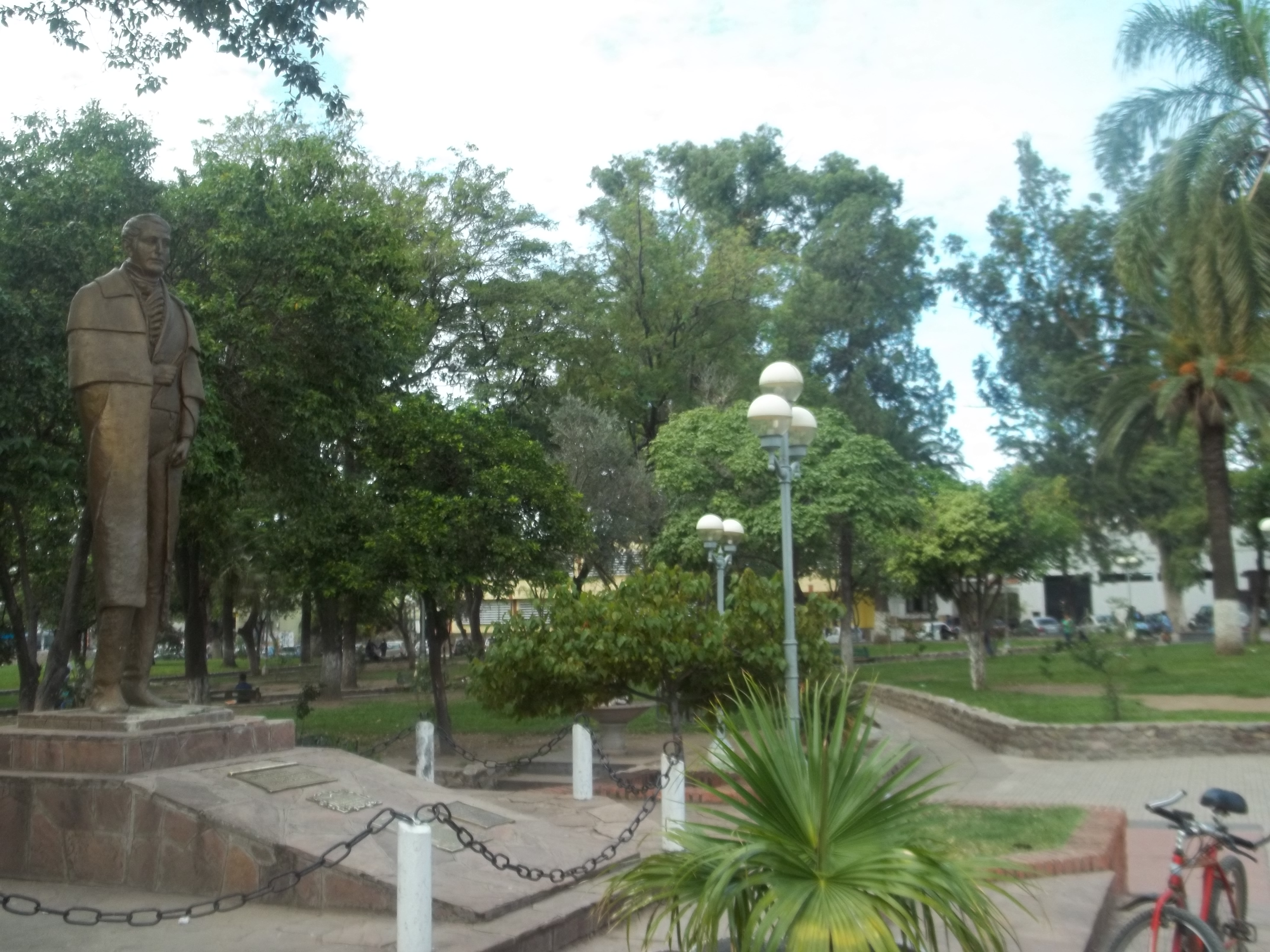 Estatua del Gral. Dr. Manuel Belgrano, de civil, en la plaza Manuel Belgrano de San Pedro de Jujuy, Argentina.